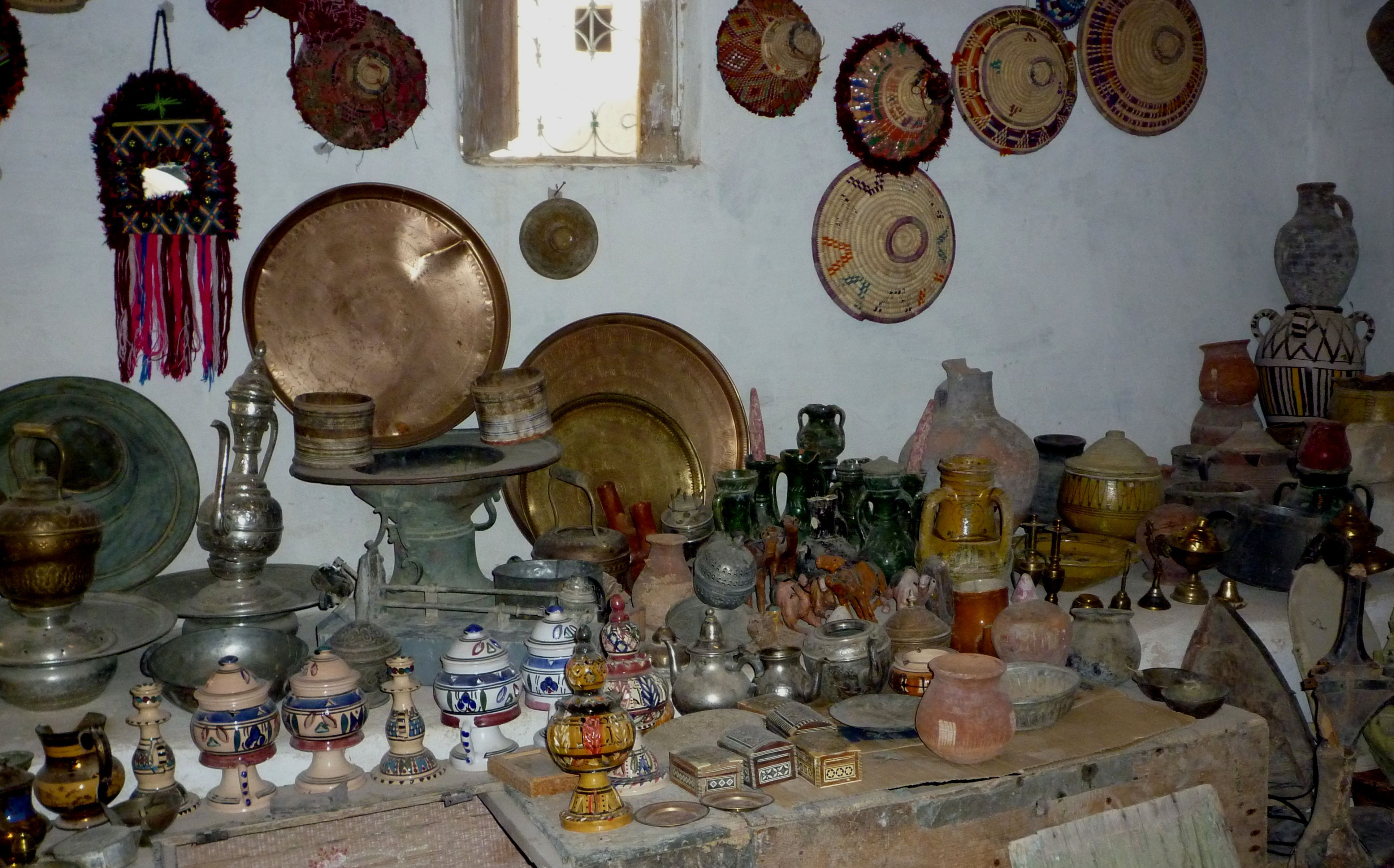 Ghadames - Souvenirgeschäft in der Altstadt